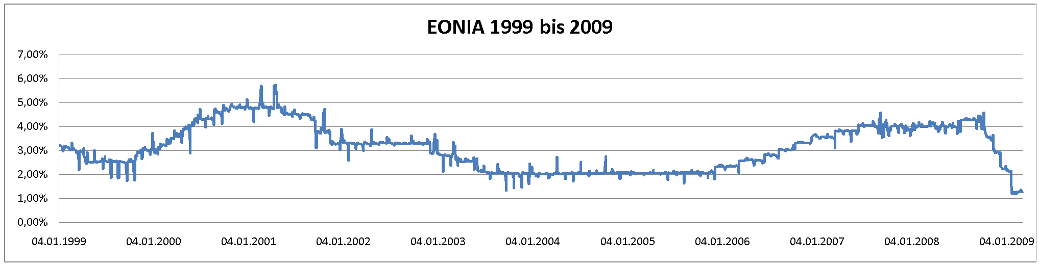 Diagramm des EONIA-Interbankensatzes zwischen 1. Januar 1999 und 5. März 2009